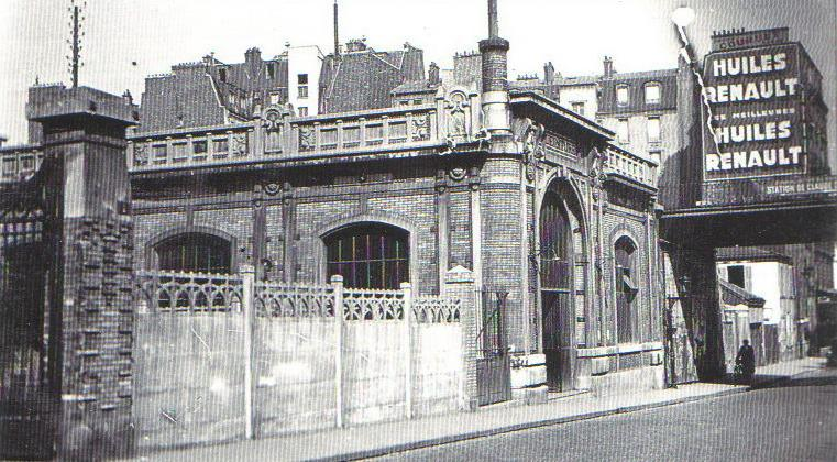 Gare Claude Decaen (Paris 12e) - Petite Ceinture